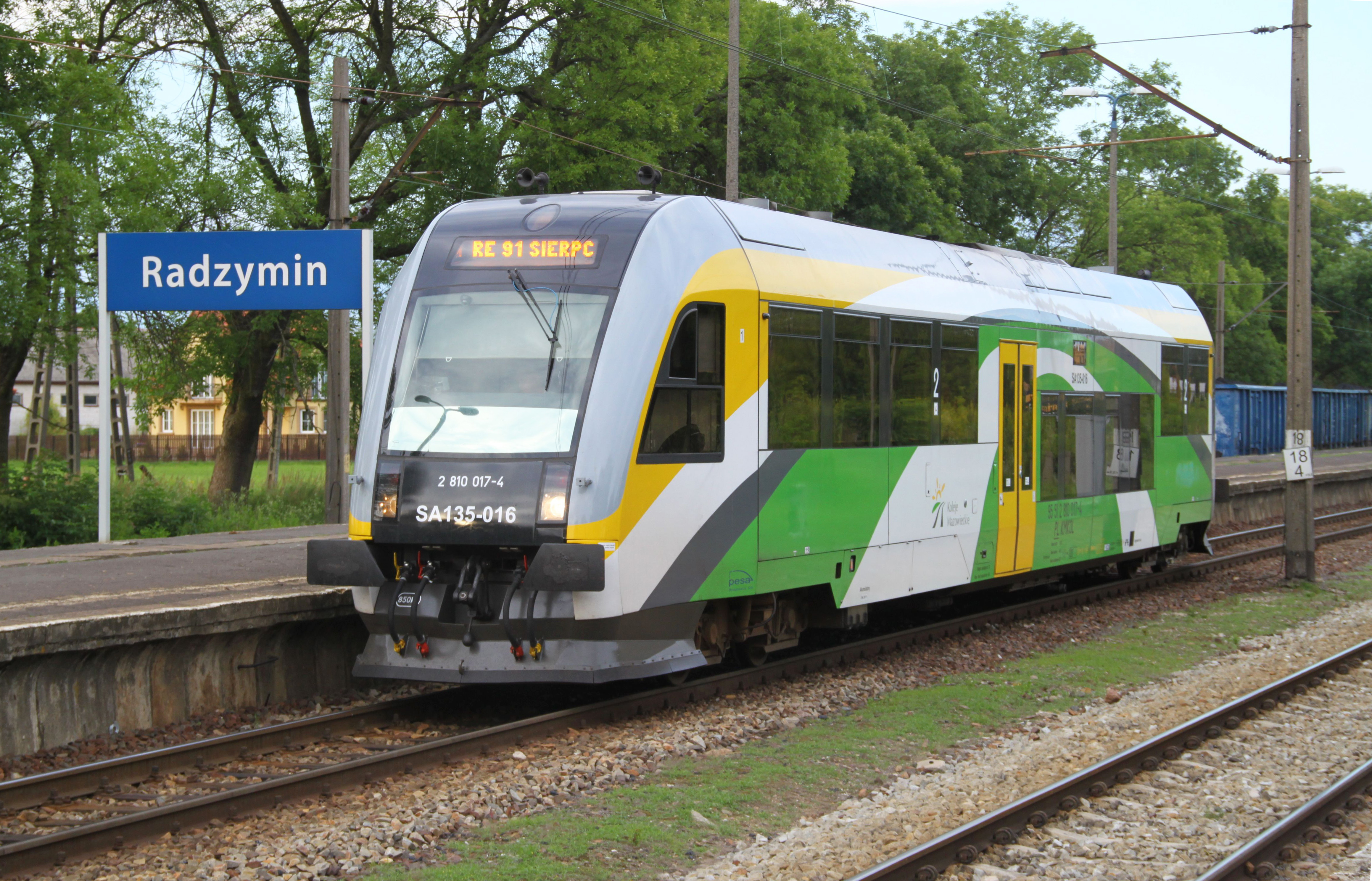 Wagon spalinowy Pesa 214Mb (SA135-016) na stacji w Radzyminie